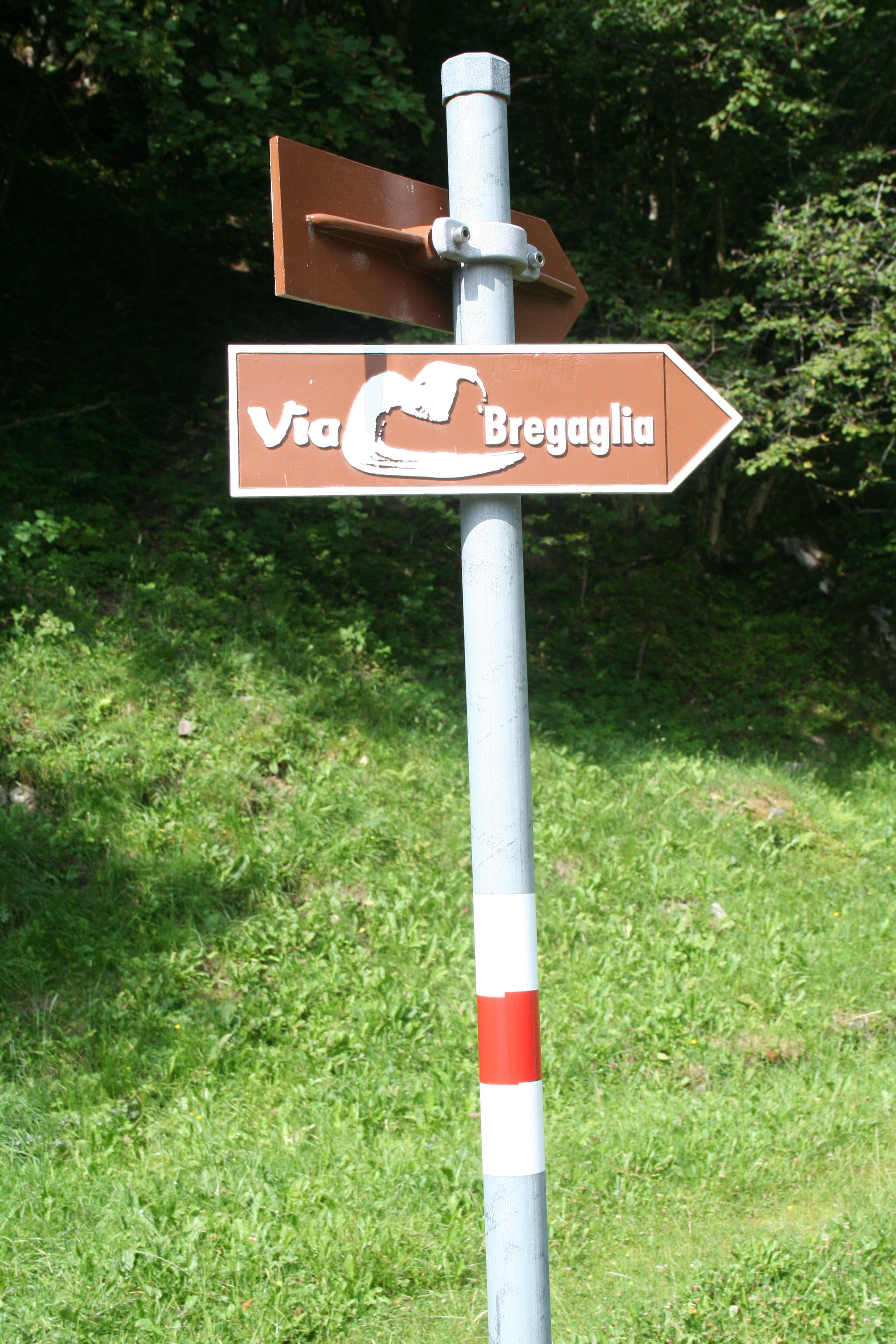 Wanderweg Val Bregaglia